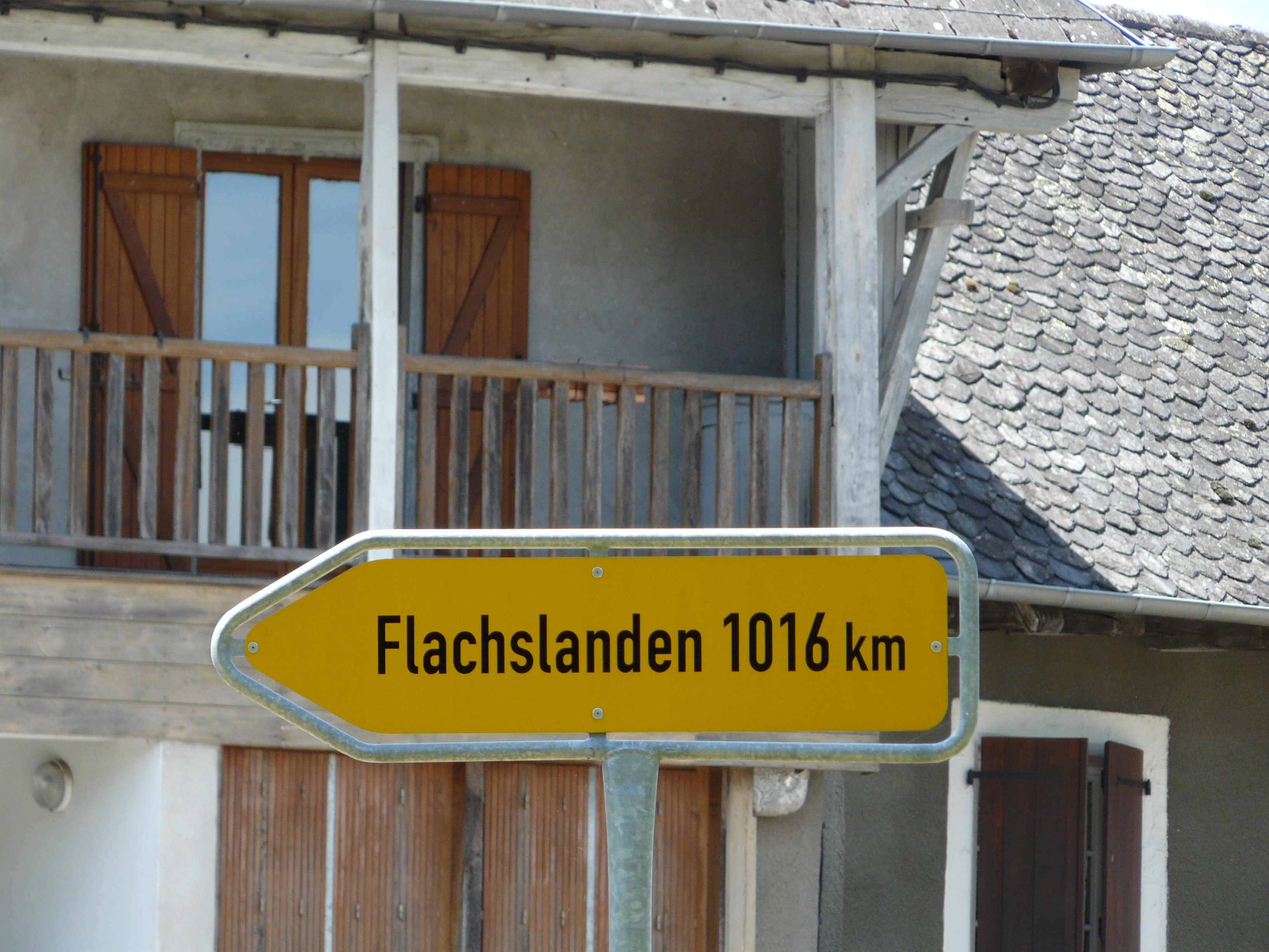 Panneau indiquant la distance jusqu'à la commune jumelée de Flachslanden, Sainte-Fortunade, Corrèze, France.